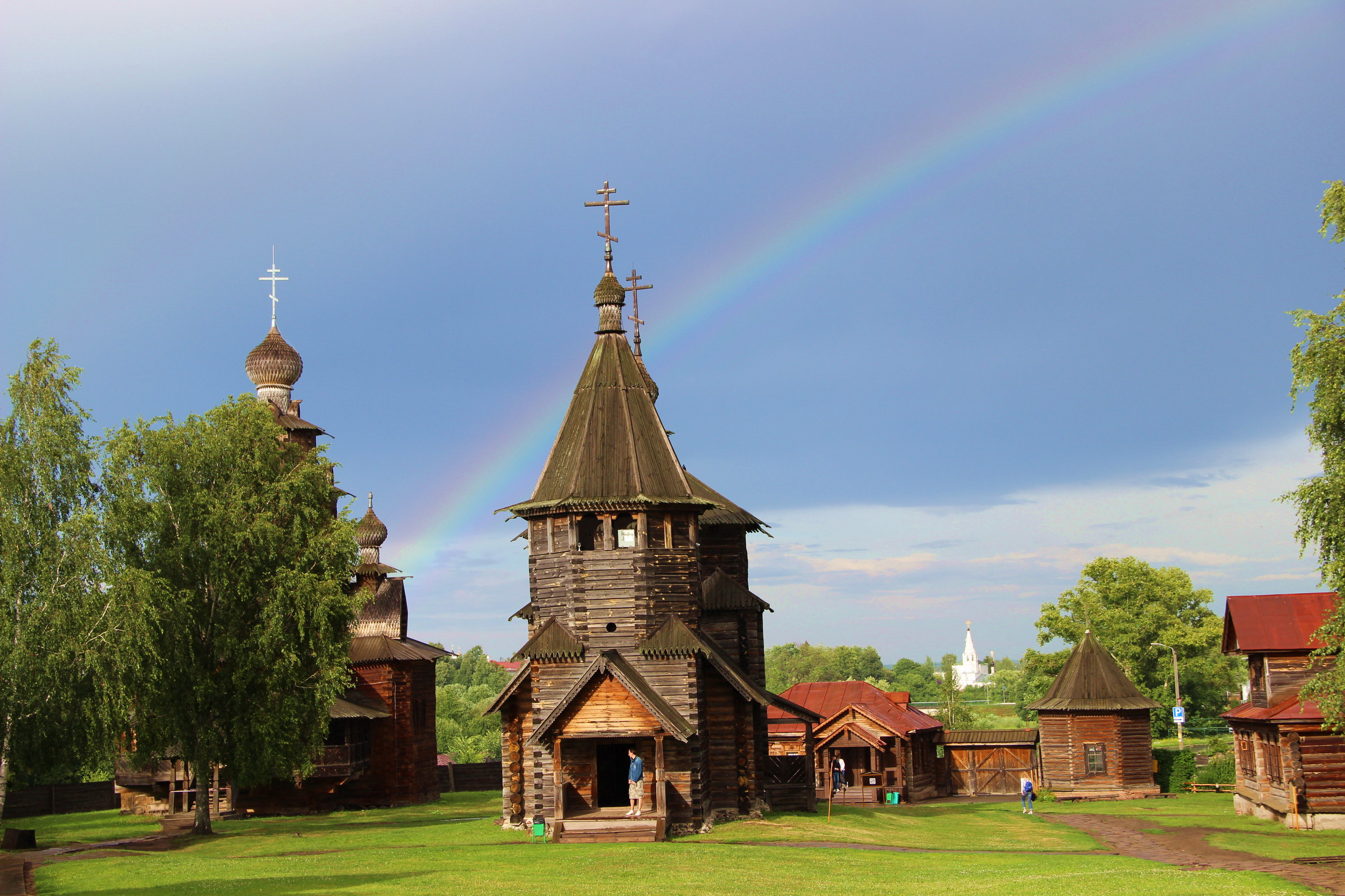 Музей деревянного зодчества и крестьянского быта: Пушкарская улица, Суздаль, Суздальский район, Владимирская область